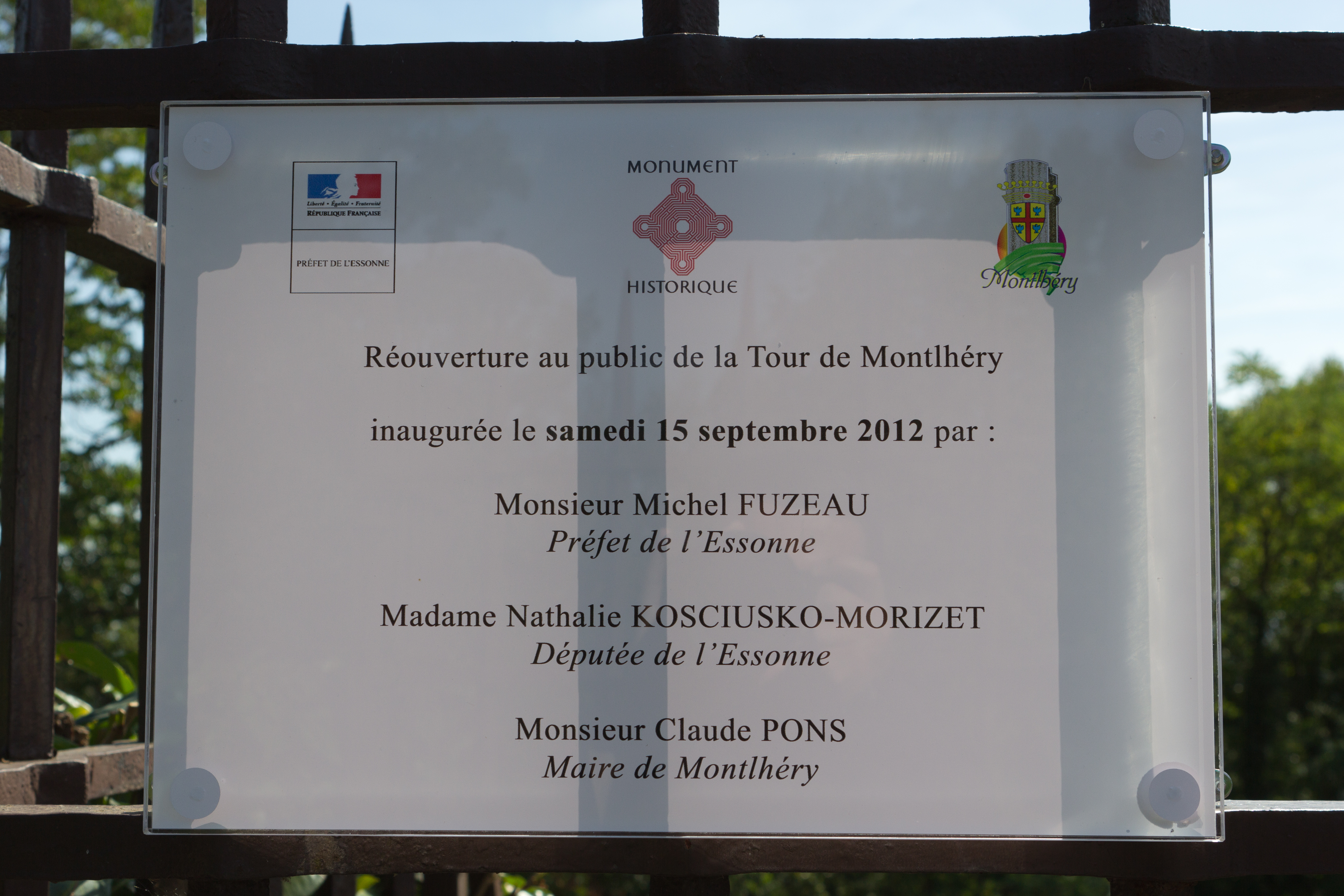 La tour du château de Montlhéry, au lendemain de sa réouverture au public le 15/09/2012 lors des "Journées du patrimoine 2012". Montlhéry, Essonne, France.